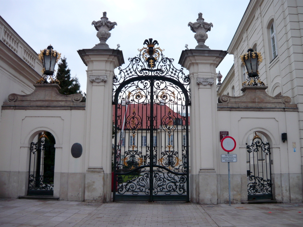 Warszawa, pałac Potockich